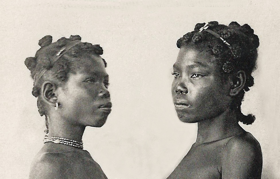 Afrique Orientale. Jeunes filles Masikoro [carte postale recadrée] pas de mention d'auteur, d'éditeur ou de date